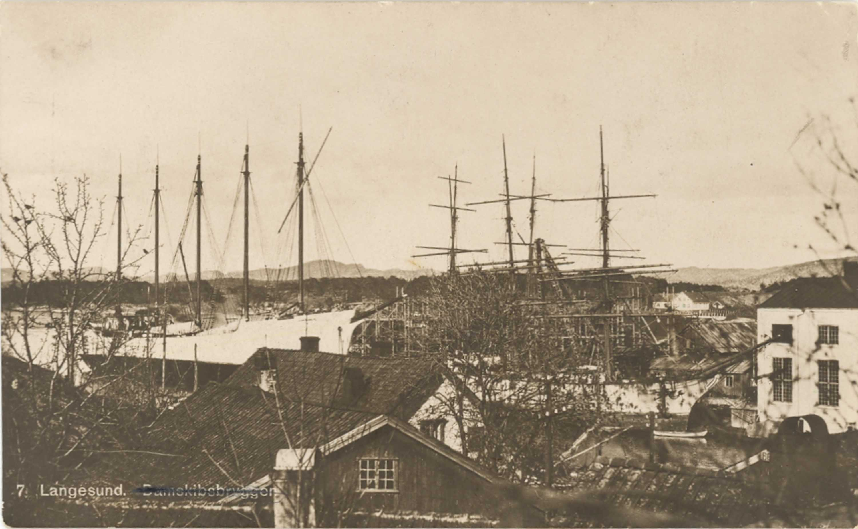 Bildet er fra Langesund Mekaniske Verksted og finnes i arkivet etter bedriften, som Telemark Museum i varetar.